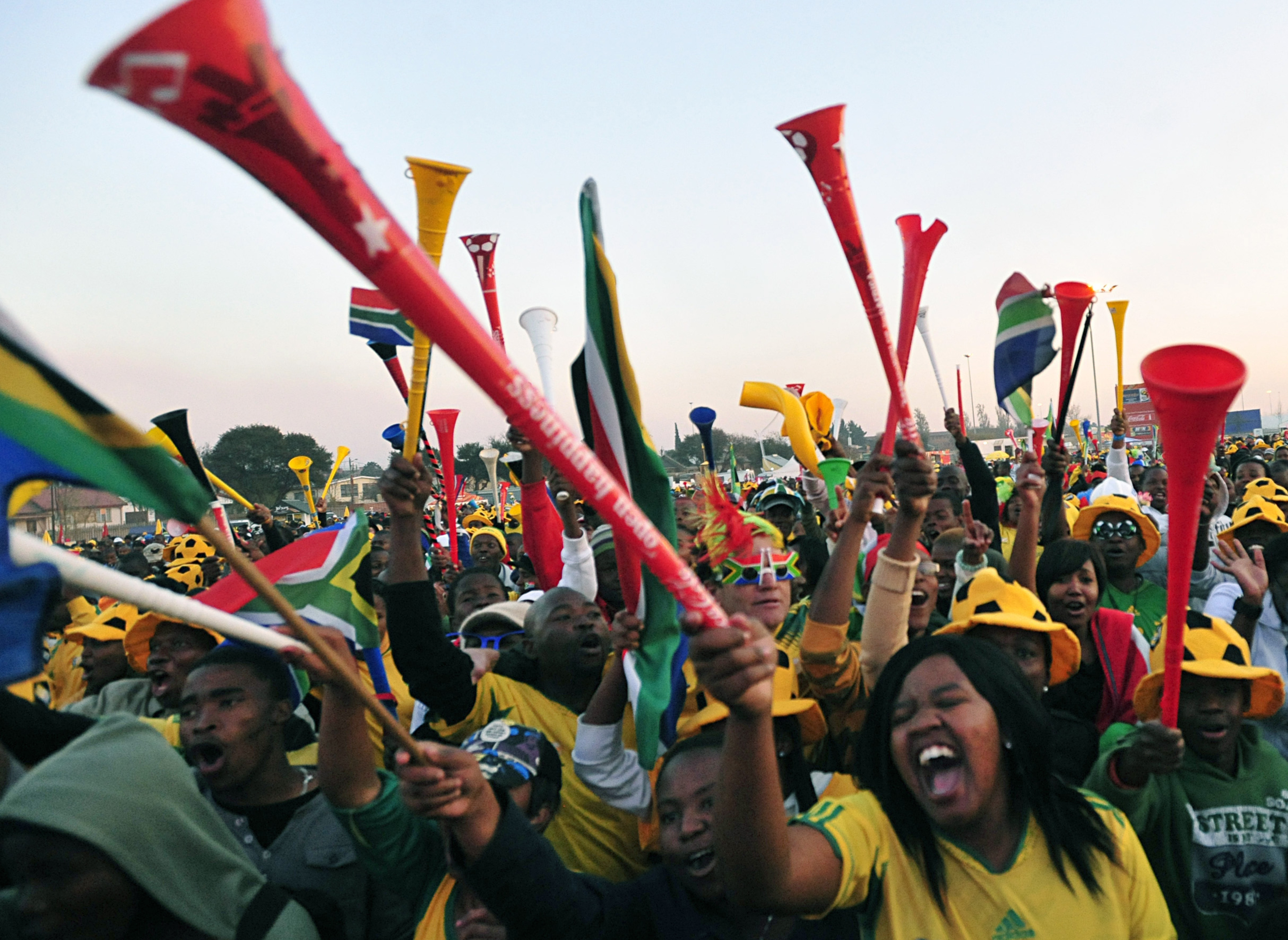 Joanesburgo - Sul-africanos fazem festa em Soweto, mesmo depois que a seleção de futebol do país foi eliminada da Copa do Mundo.